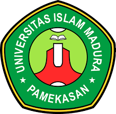 Universitas Islam Madura Pamekasan